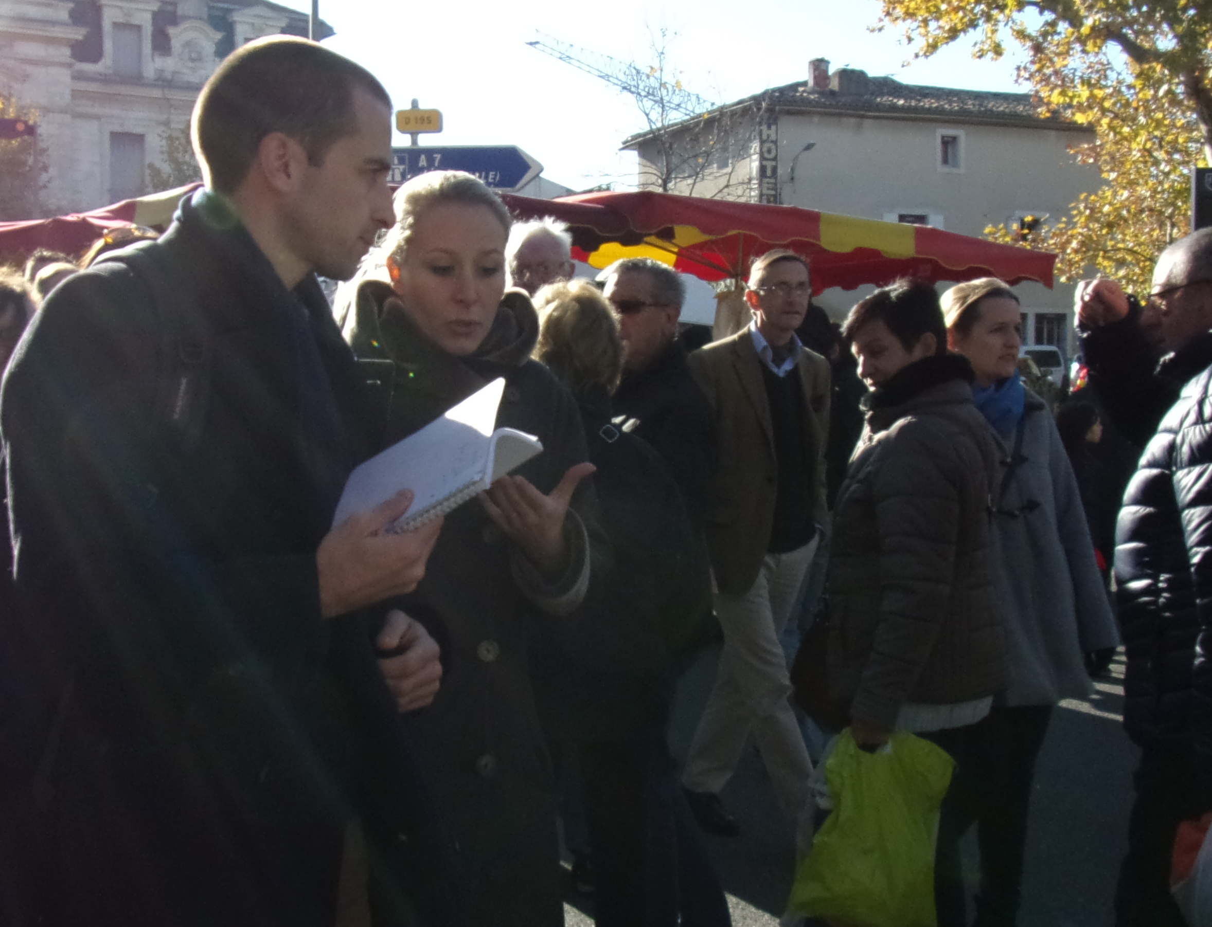 foire de la Saint Siffrein 2015 à Carpentras